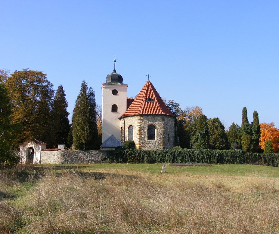 Levý Hradec